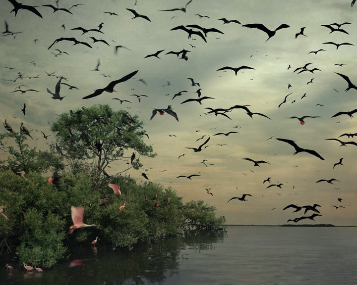 Isla de los Pájaros, pequeña Isla poblada por distintas especies de aves de la región. Actualmente se hace un trabajo de concientización y conservación del área. This image contains digital watermarking or credits in the image itself. The usage of visible watermarks is discouraged. If a non-watermarked version of the image is available, please upload it under the same file name and then remove this template. Ensure that removed information is present in the image description page and replace this template with metadata from image or attribution metadata from licensed image . Caution: Before removing a watermark from a copyrighted image, please read the WMF's analysis of the legal ramifications of doing so, as well as Commons' proposed policy regarding watermarks. If the old version is still useful, for example if removing the watermark damages the image significantly, upload the new version under a different title so that both can be used. After uploading the non-watermarked version, replace this template with superseded|new filename|version without watermarks .